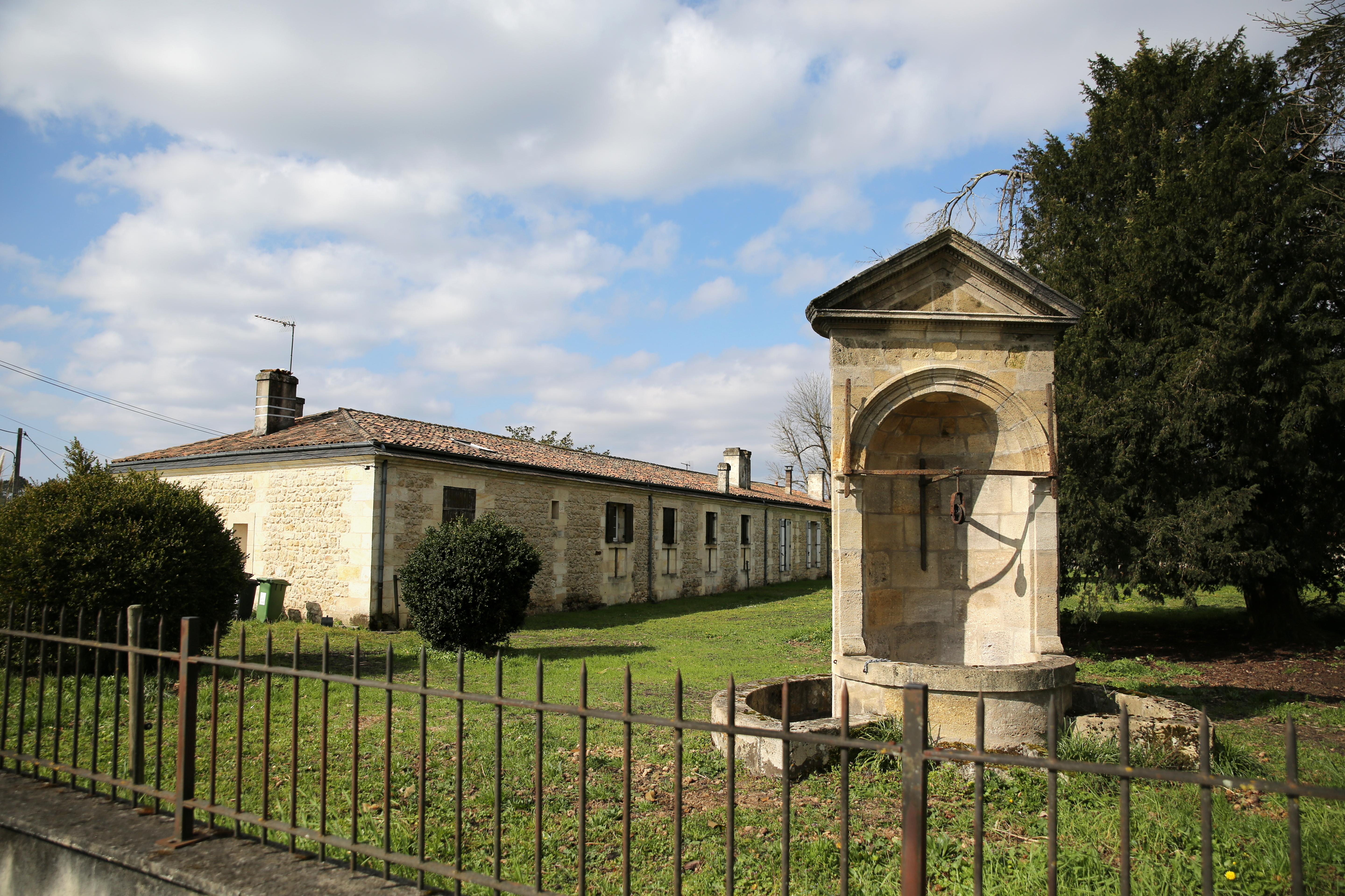 Ferme de Cérillan